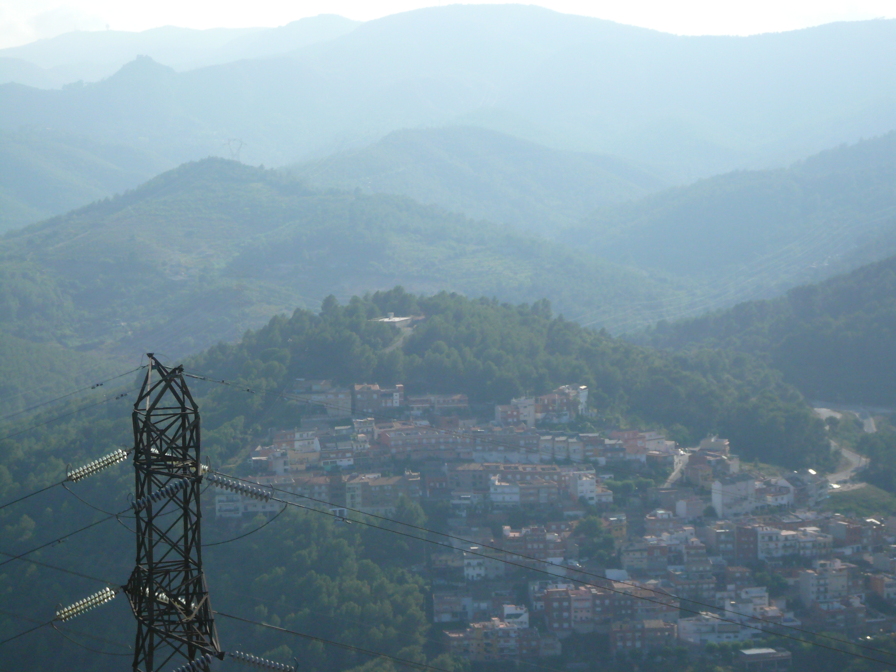 Vista des de l'ermita de Sant Ramon, al cim del Montbaig (Sant Boi de Llobregat).